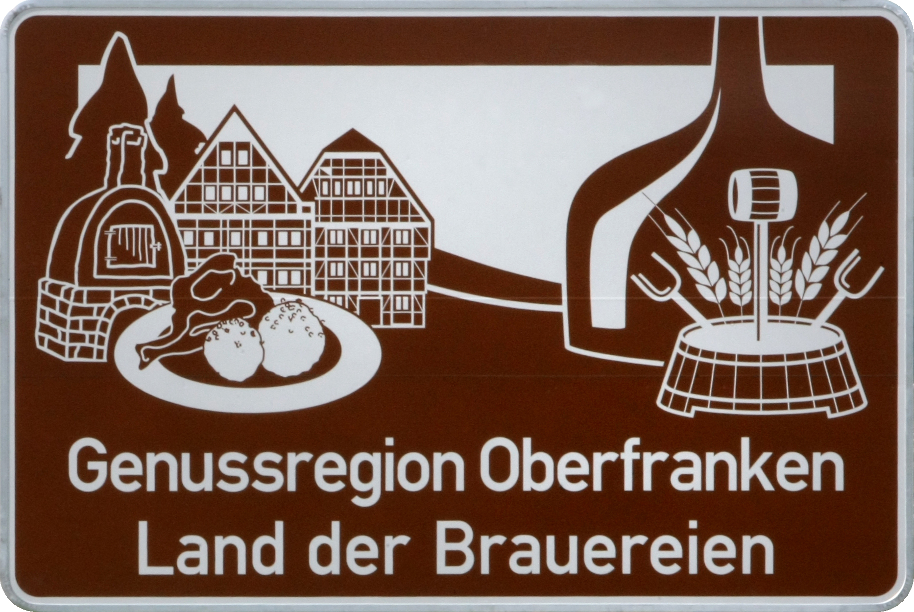 Der Verein Bierland Oberfranken e.V. wurde im Jahr 2004 mit dem Ziel gegründet, die weltweit einmalige Bierkultur und Biervielfalt Oberfrankens zu bewahren, und in Oberfranken, aber auch über Oberfranken hinaus, bekannt zu machen. Eines der Projekte des Vereins war das Aufstellen von insgesamt acht Autobahnschildern mit der Aufschrift „Genussregion Oberfranken – Land der Brauereien".